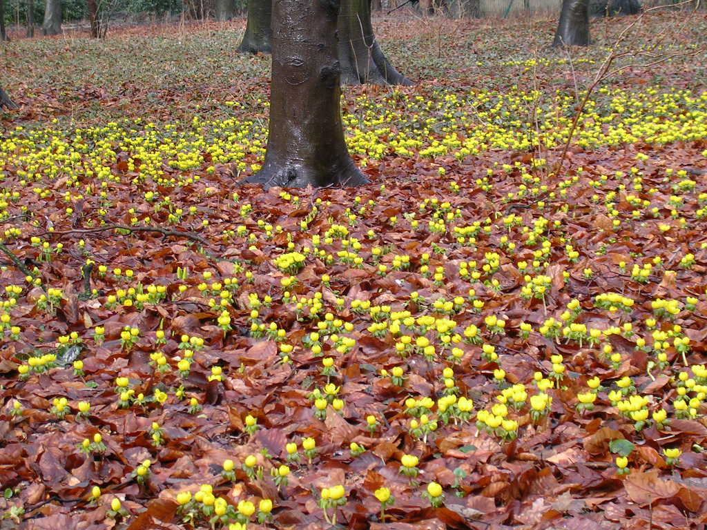 Tierpark Berlin - Winterlinge (Eranthis hyemalis)